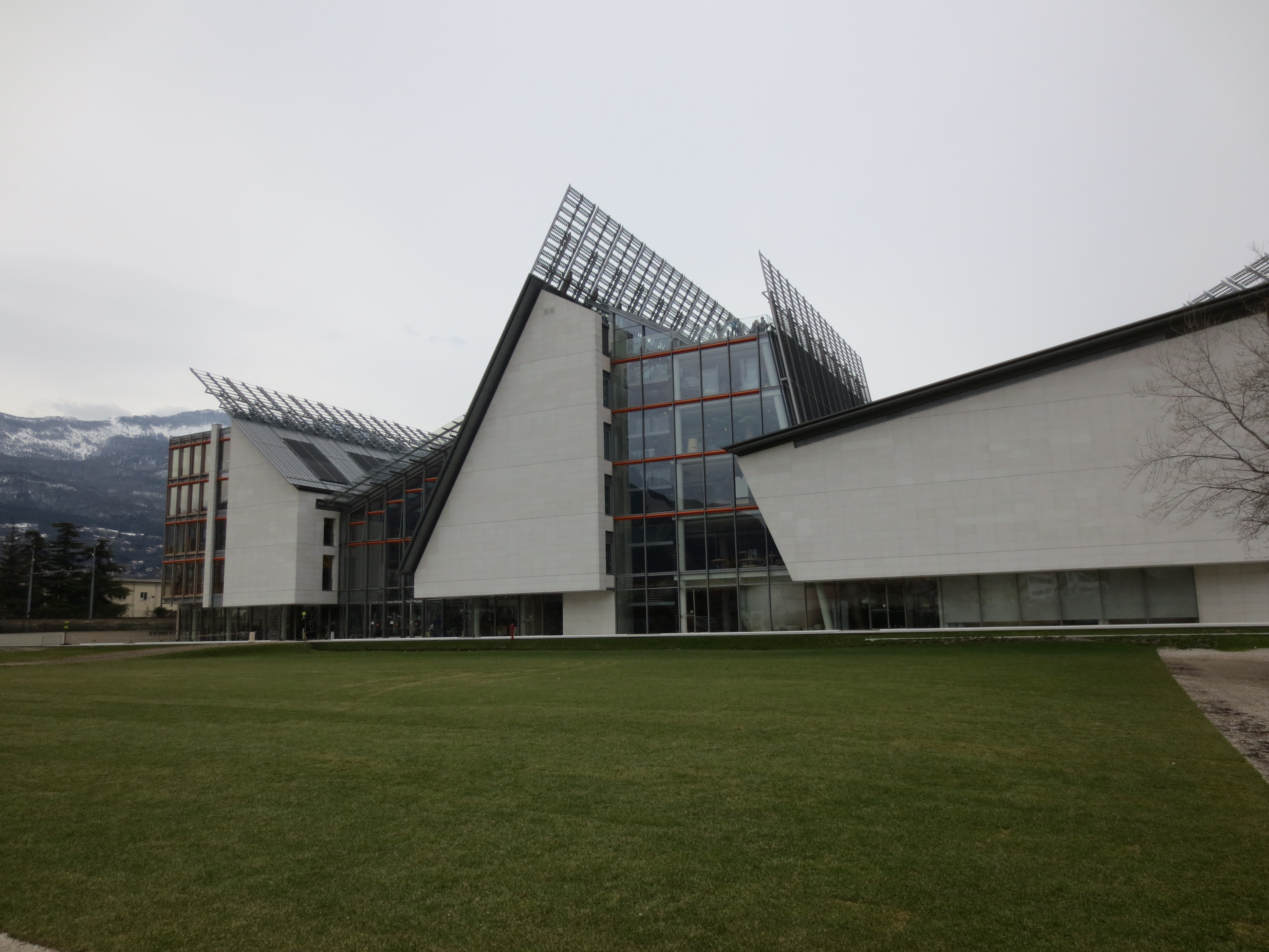 Facciata nord del Museo delle Scienze di Trento (MuSe).